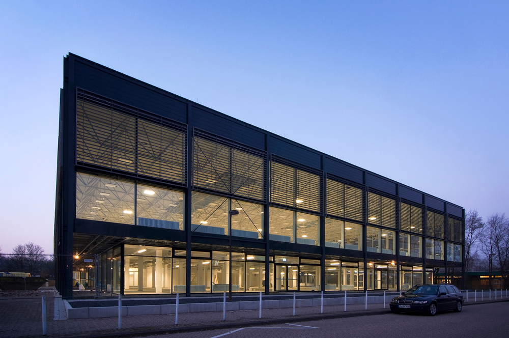 Außenansicht der BlueBox Bochum in der Dämmerung